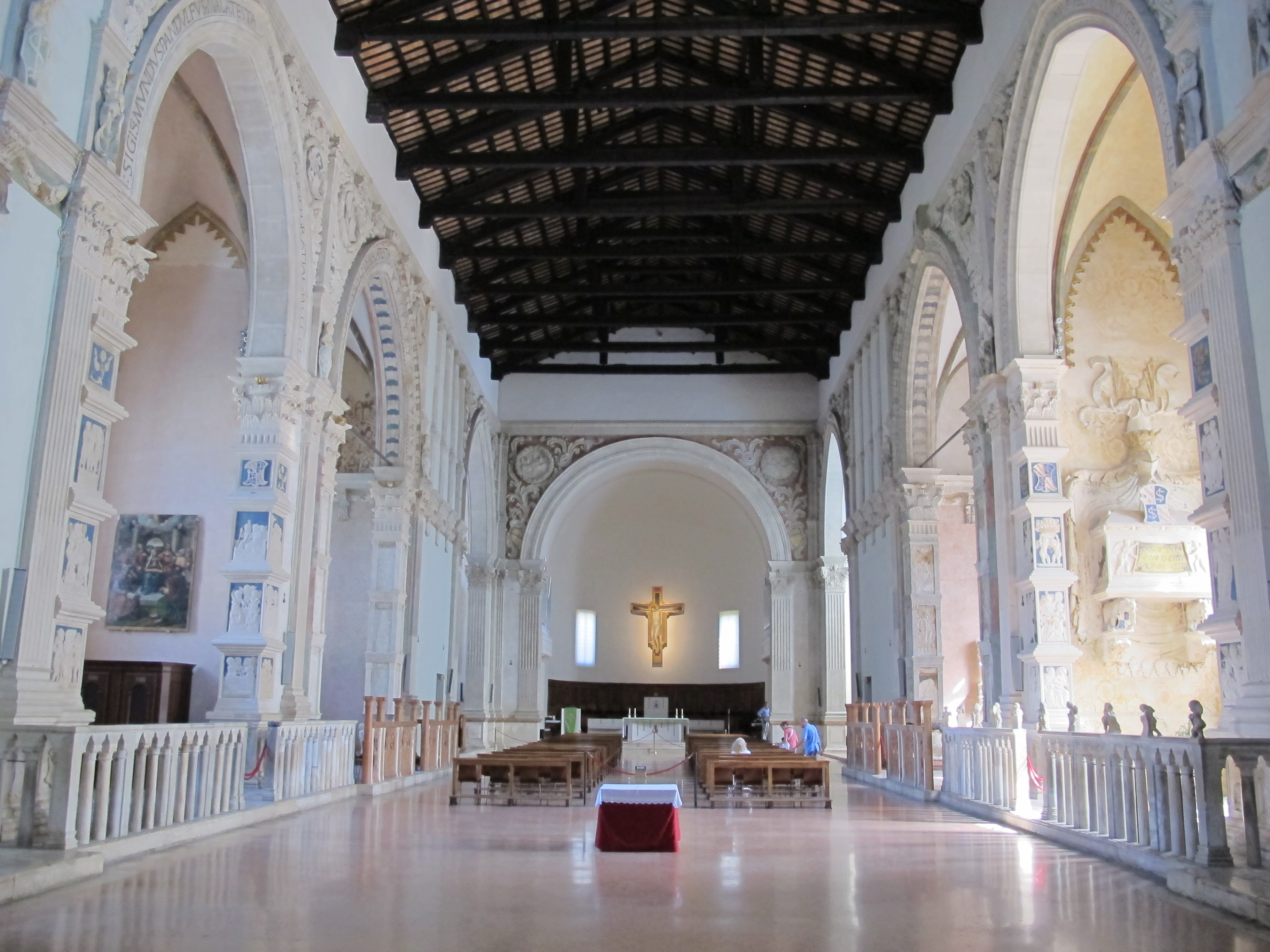 Tempio Malatestiano - MIBAC This is a photo of a monument which is part of cultural heritage of Italy.